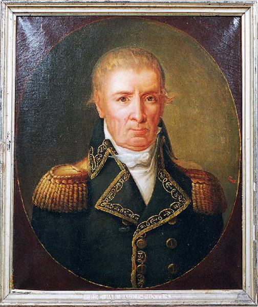 Portrait du capitaine Landolphe, huile sur toile, 64 x 53 cm. Donné avant 1870 au musée d'Auxonne par M. Paget-Pontus (inv. 2010.0.60).